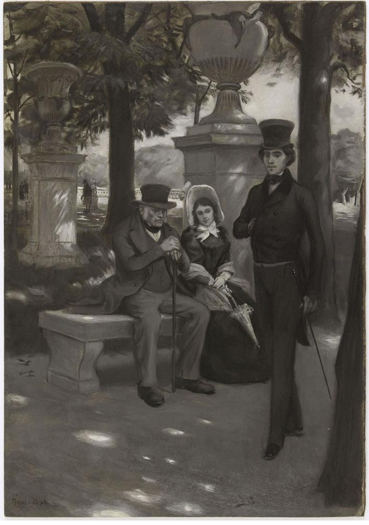 Commencement d'une grande maladie : au jardin du Luxembourg, la vue de Cosette suscite un vif émoi chez Marius. Gravure de Louis Muller (1864-19..) d'après un dessin de Pierre Georges Jeanniot pour Les Misérables de Victor Hugo, tome III, livre sixième, chapitre 4.